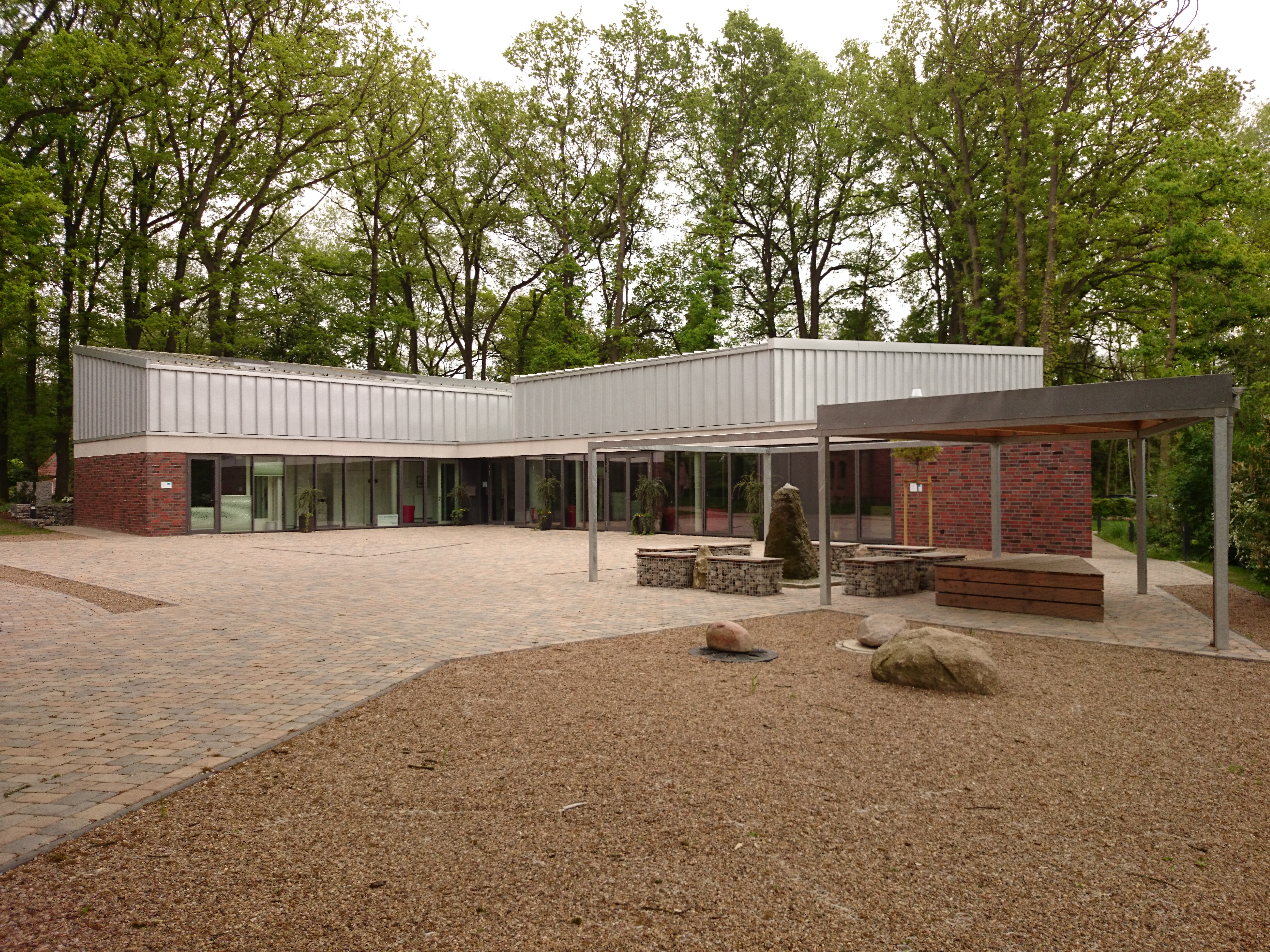 Das Haus der Begegnung in Fintel neben der St. Antoniuskirche, Rotenburger Straße 11.